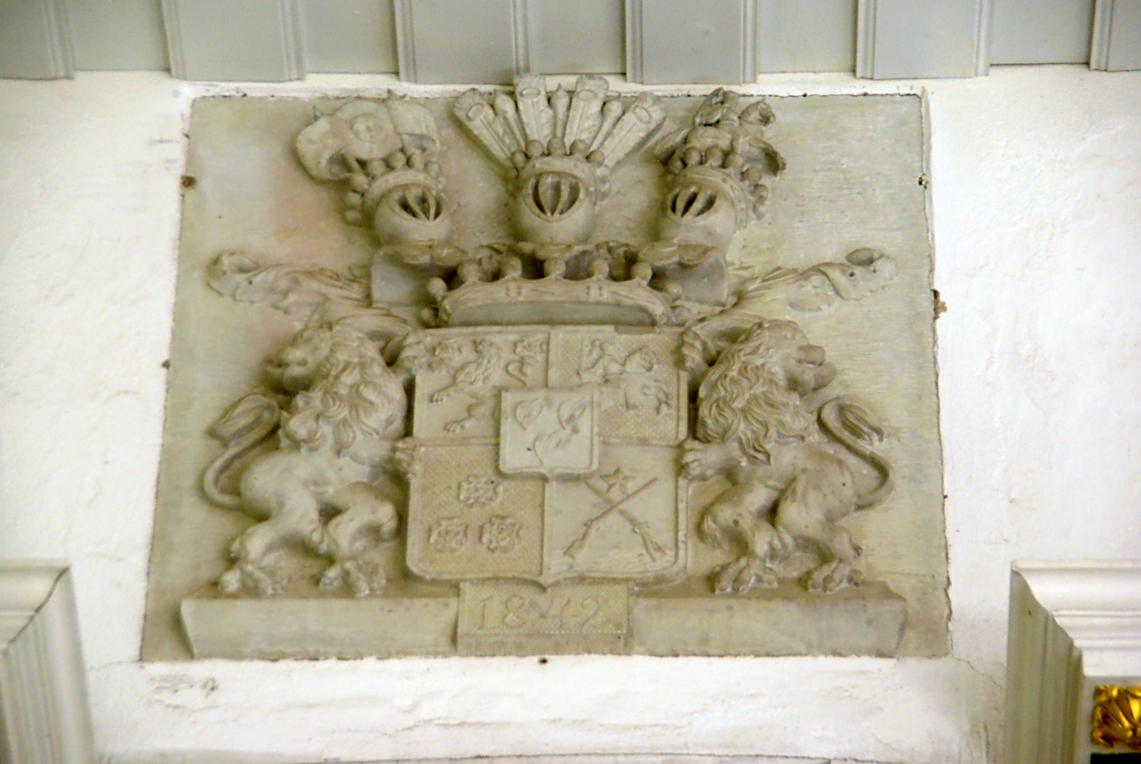 Vapp, 1842 (dolomiit)